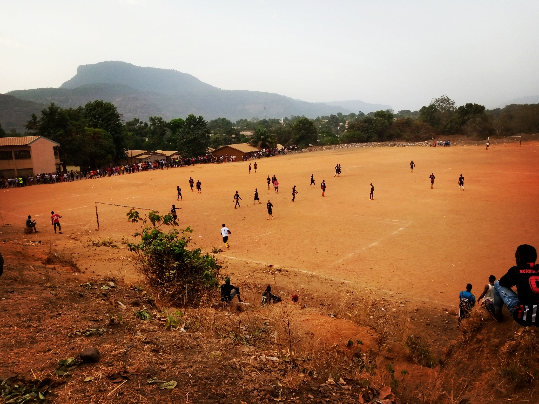 Ce terrain renommer (terrain rouge) se situe a quelques kilomètres de la grande ville de Kindia (Guinée) This is an image with the theme "Africa on the Move or Transport" from: Guinea